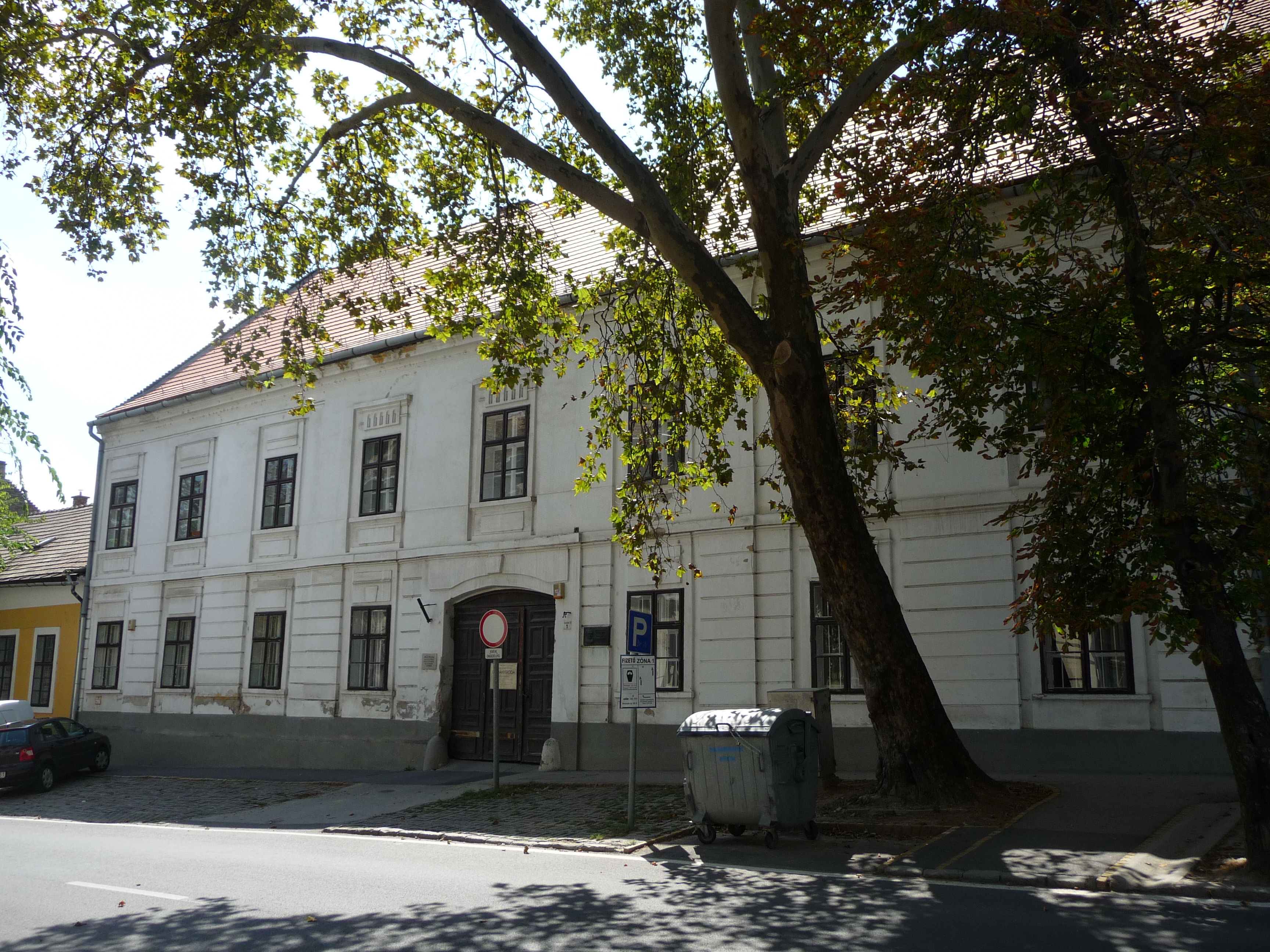 Tormay-ház Szekszárdon